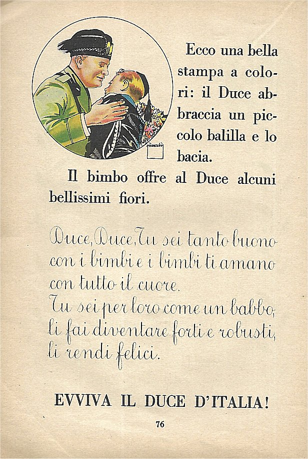 Il libro della prima classe - il Duce abbraccia un piccolo Balilla e lo bacia - pag. 76